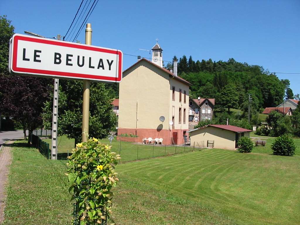 Le Beulay Entrée côté Saint-Dié et la mairie Commune du canton de Provenchères-sur-Fave (Vosges) Photo personnelle du 15 juillet 2006. Copyright © Christian Amet